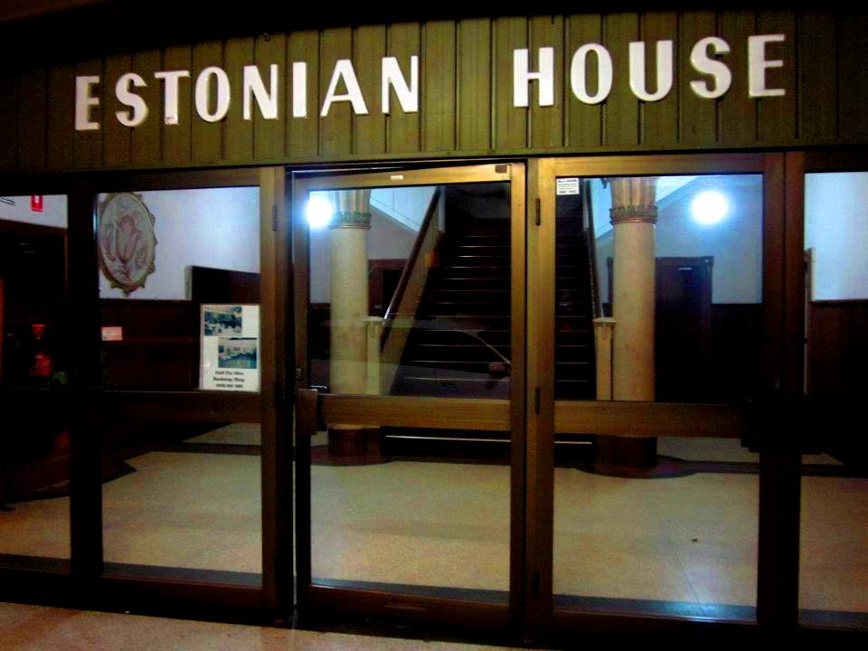 Melbourne'i Eesti Maja